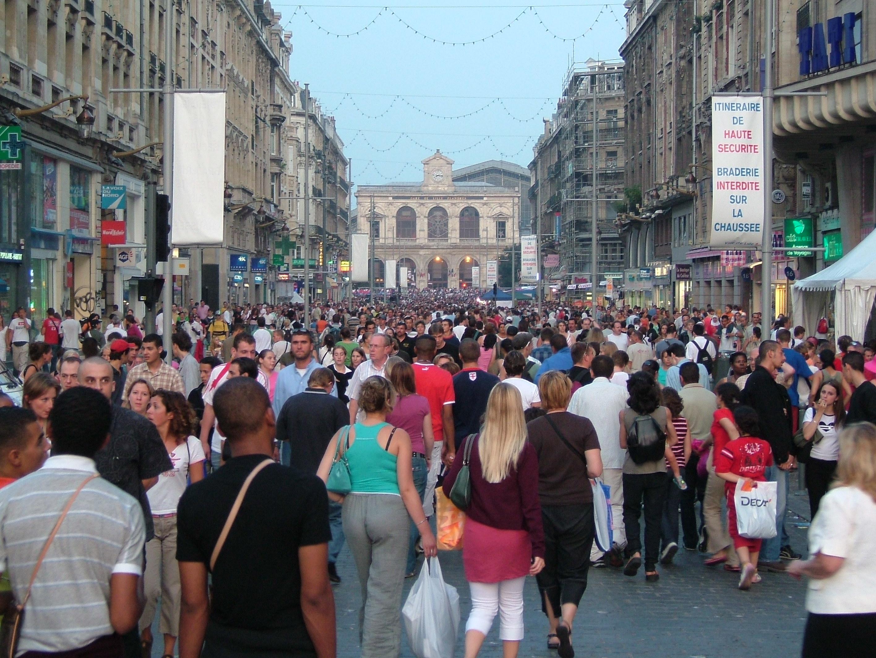 Rue Faidhebre lors de la Braderie de Lille 2005, photo personnelle